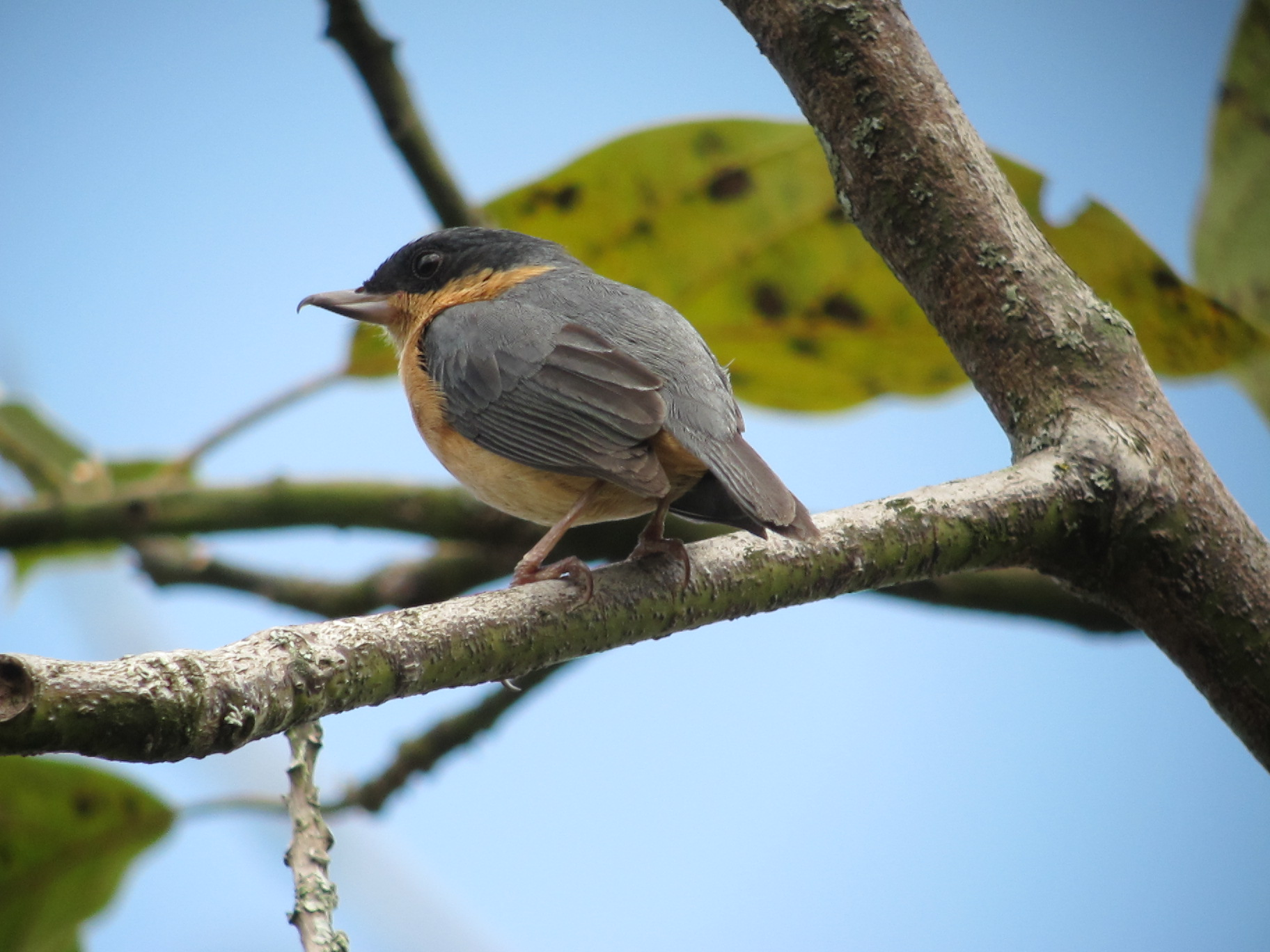 Rionegro, Antioquia, Colombia